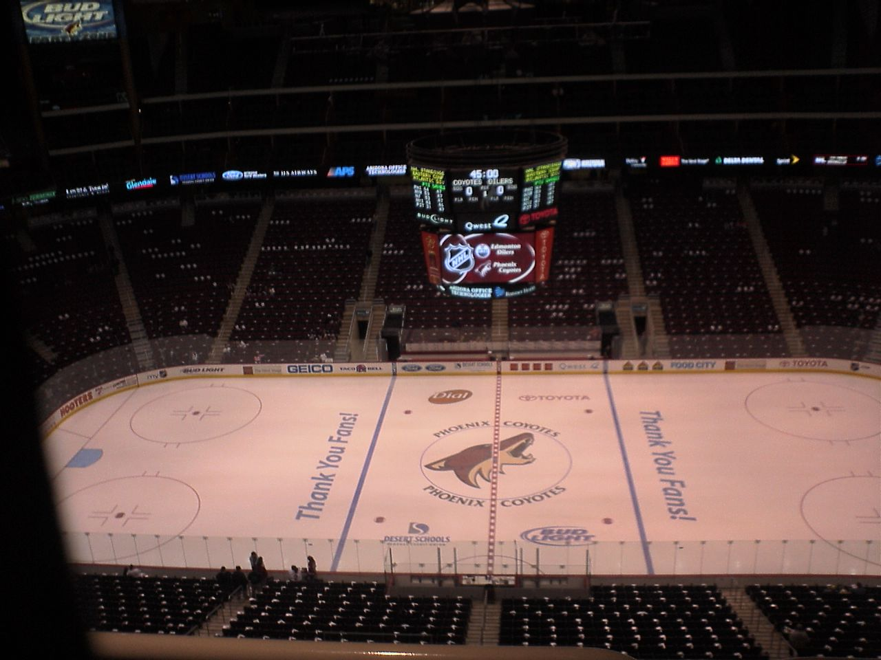 glendale arena auteur : Fantt